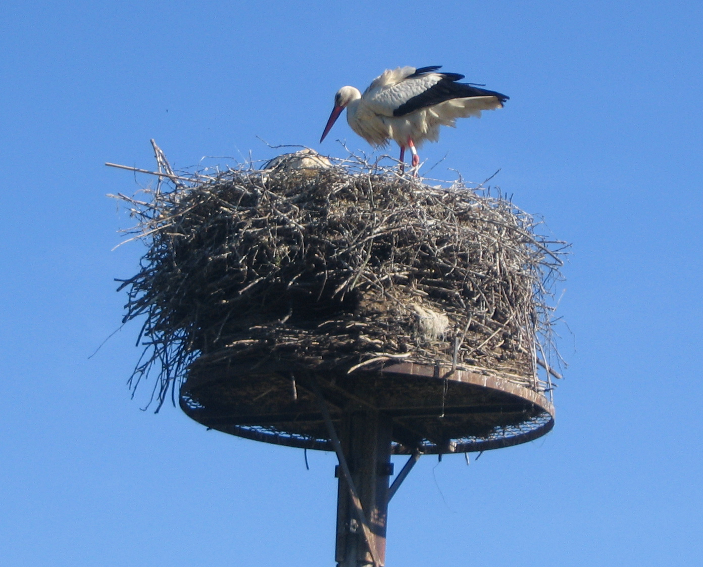 Cigogne sur son nid (Parc des oiseaux de Villars les Dombes, 2004).